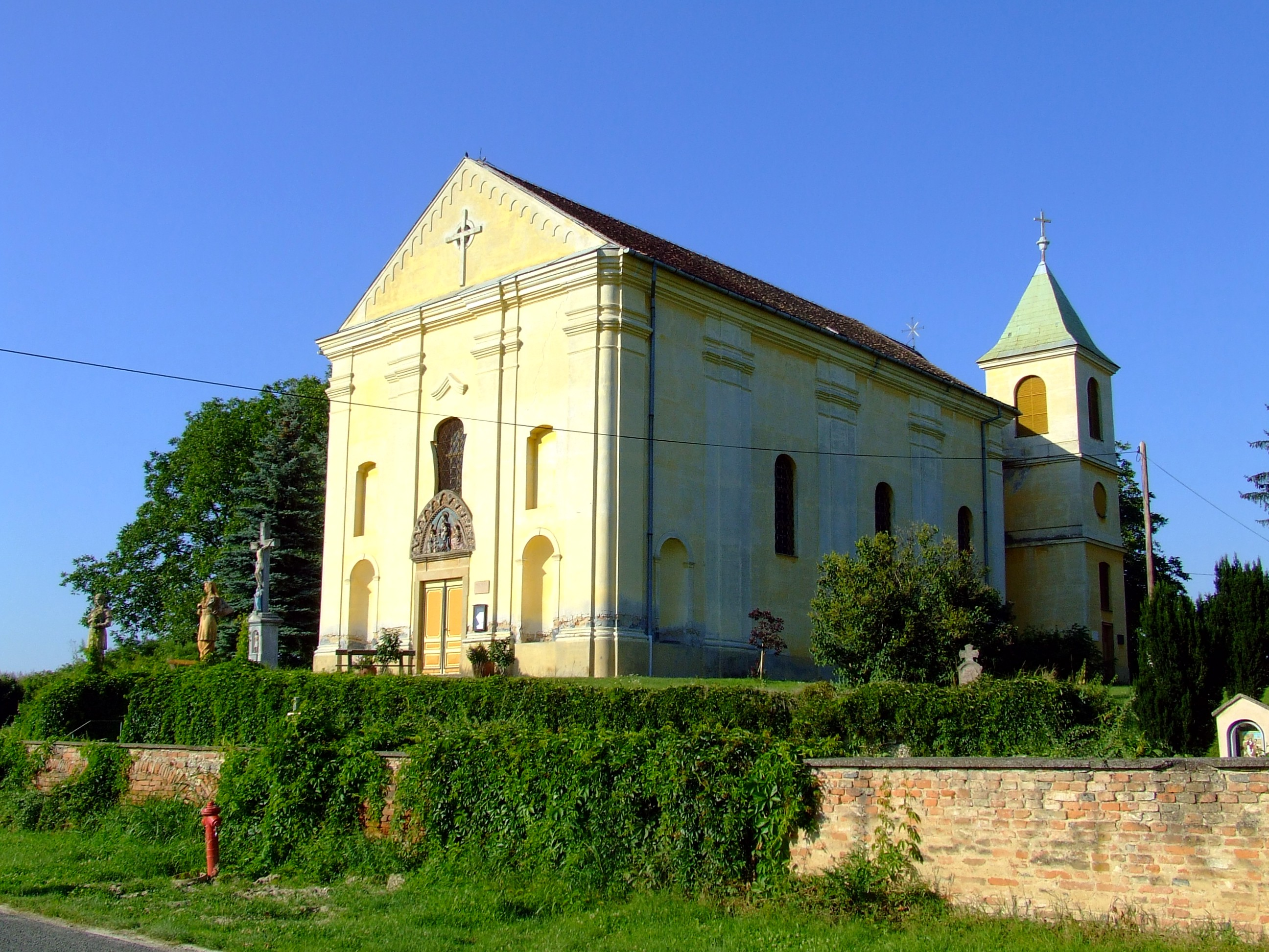 A máriakéméndi Nagyboldogasszony-templom This is a photo of a monument in Hungary. Identifier: 1503